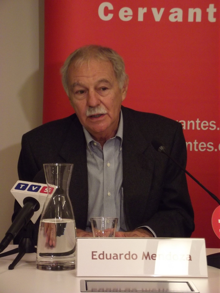 Zdjęcie zrobione podczas spotkania z Eduardo Mendozą w Instytucie Cervantesa w Krakowie.